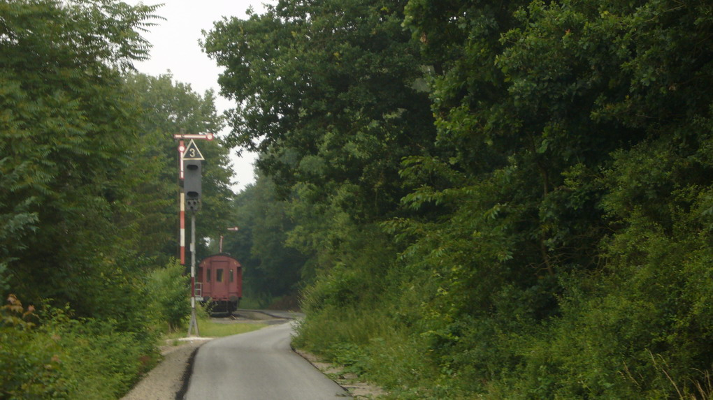 Alter Waggon als Gaststätte bewirtschaftet am Ostbahnhof Burghaun (Kegelspiel-Radweg)